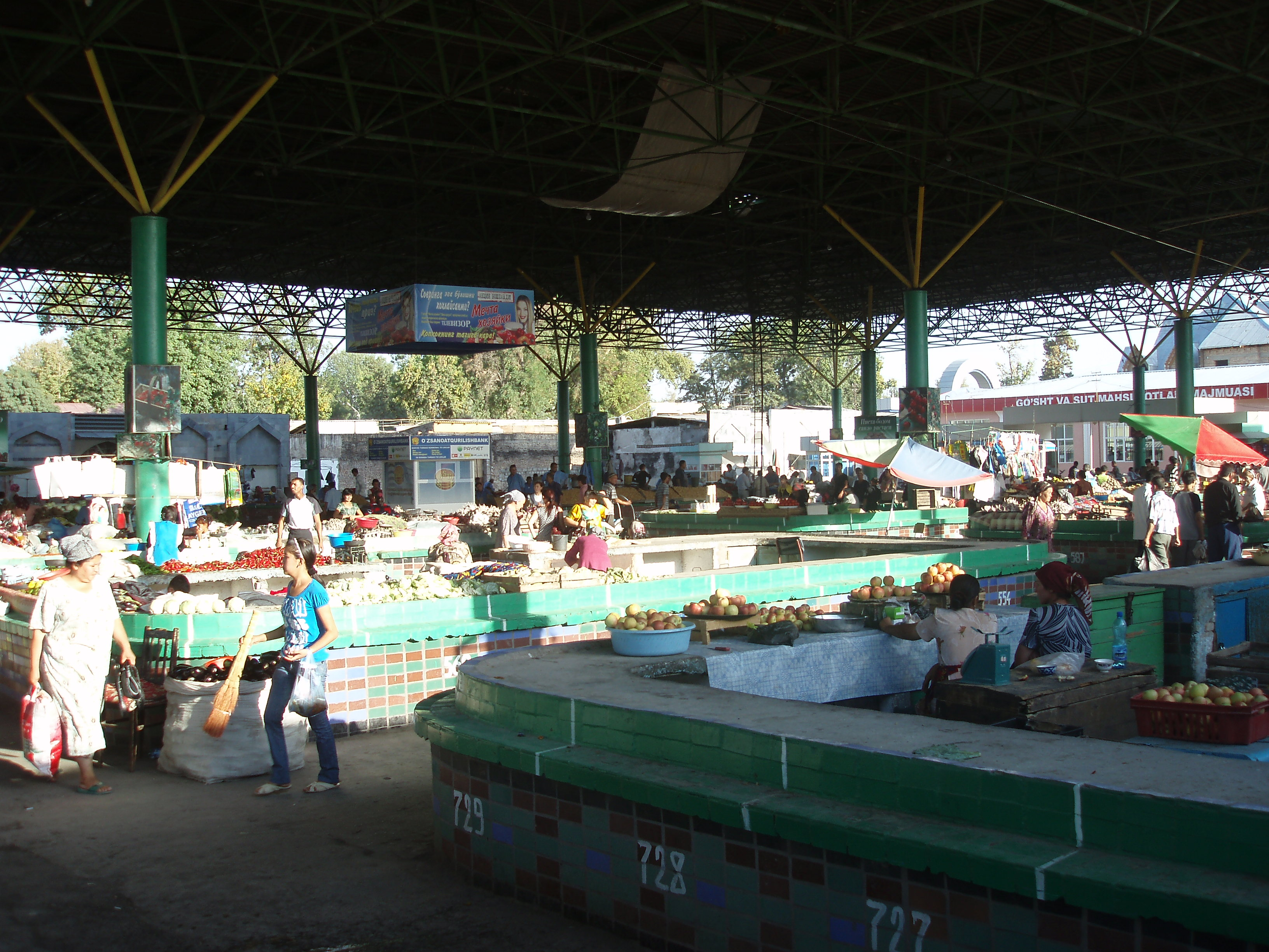 im Basar von Fargʻona, Usbekistan